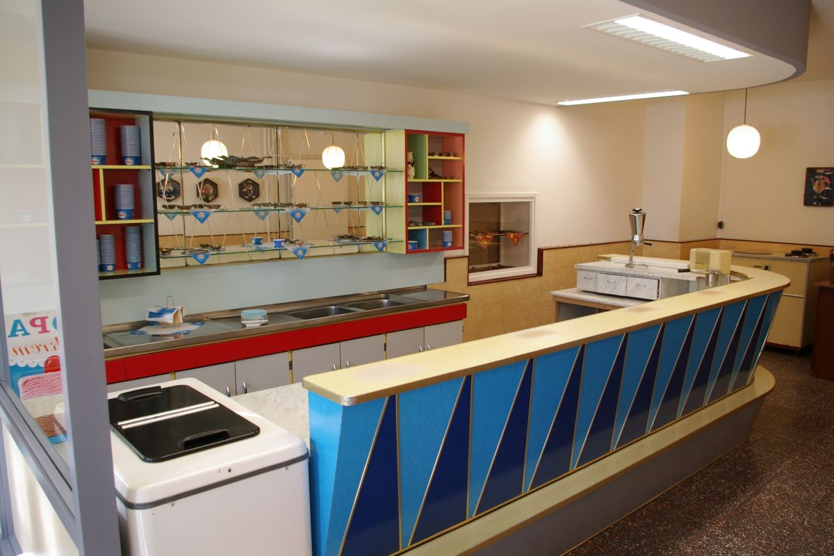 Eisdiele